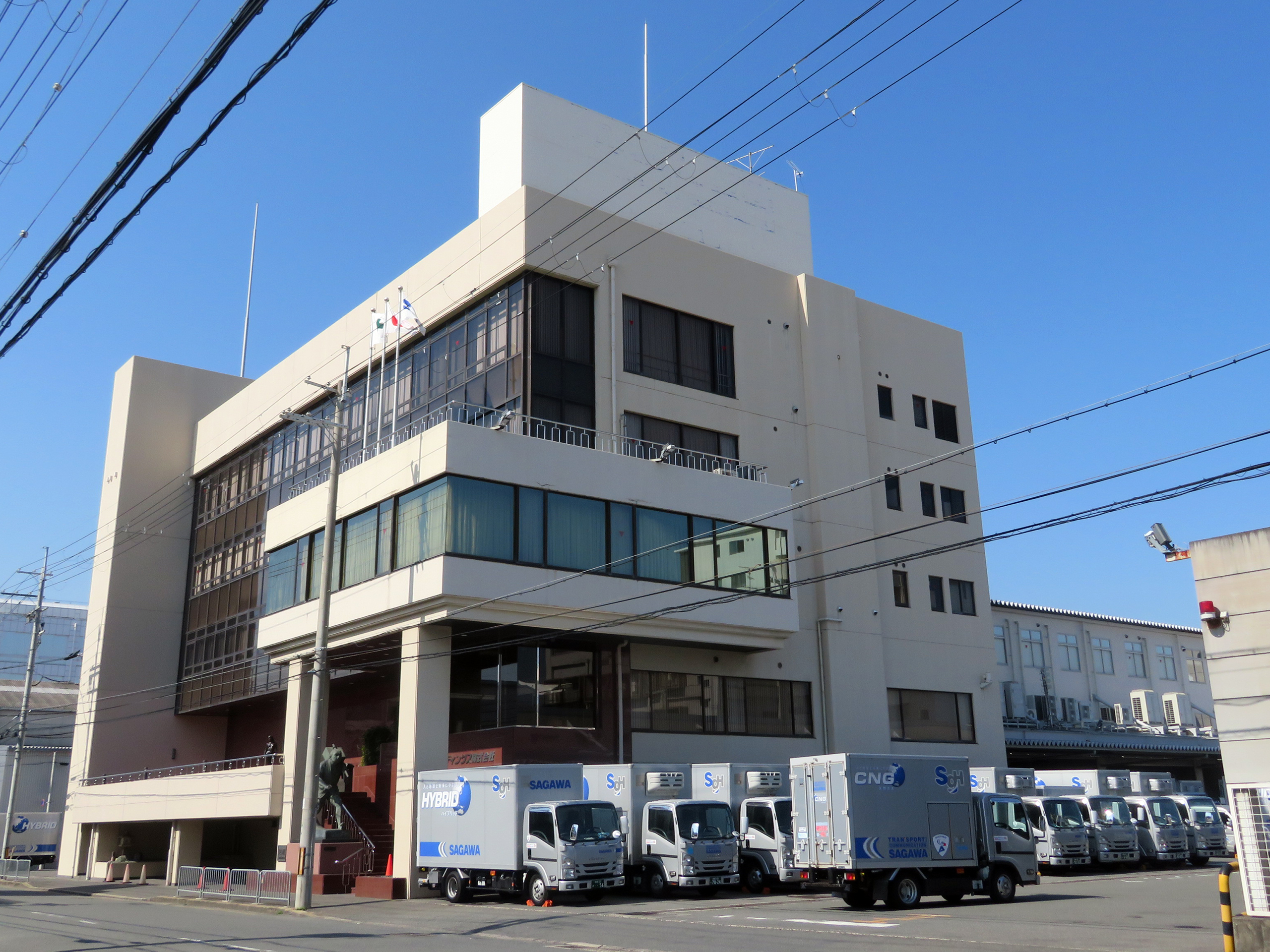 SGホールディングス株式会社本社を撮影。